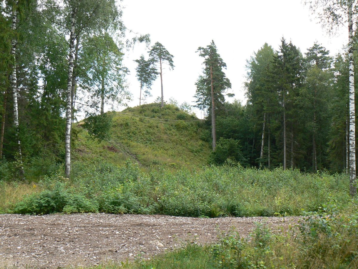 Jäneda linnamägi Kalijärve poolt vaadatuna